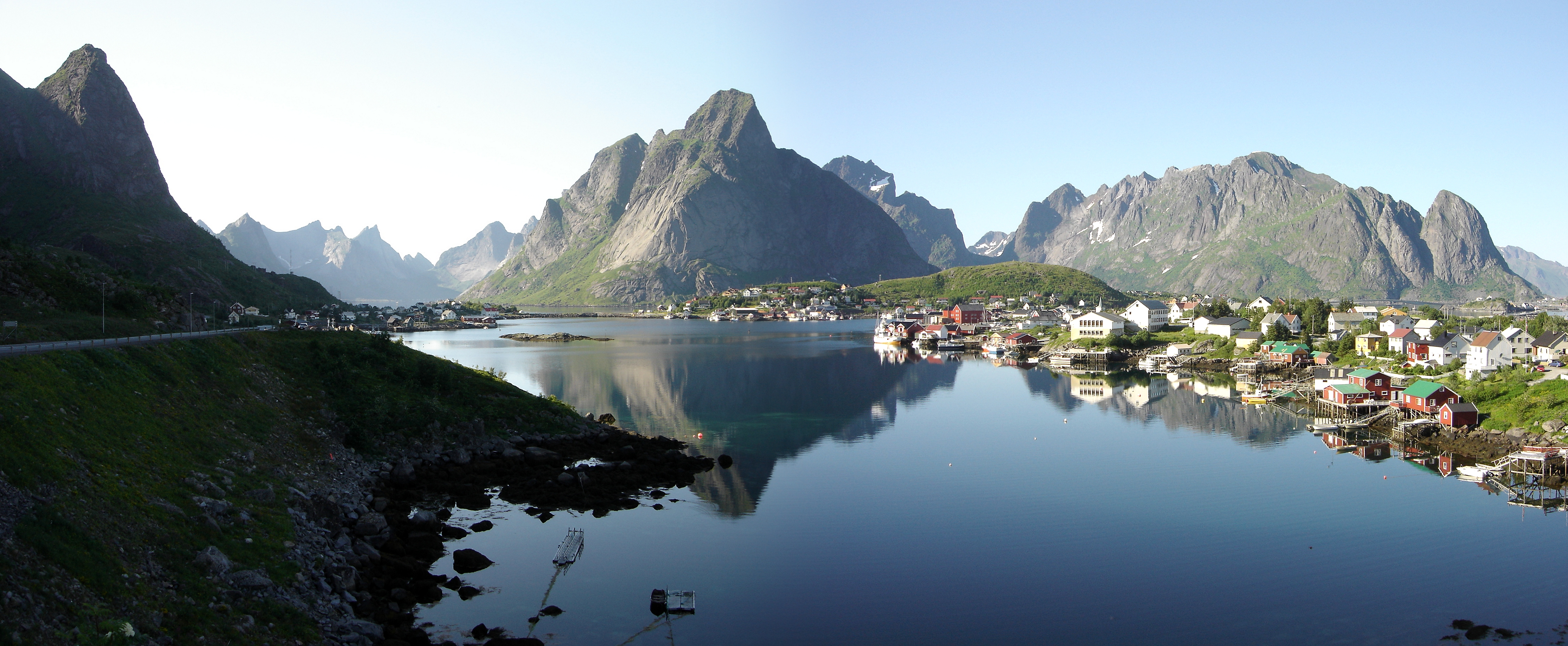 Reine auf den Lofoten, Norwegen.